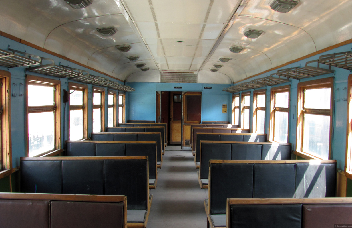 Салон вагона электропоезда ЭР1-02 Россия, Новосибирская область, МЖТ на станции Сеятель